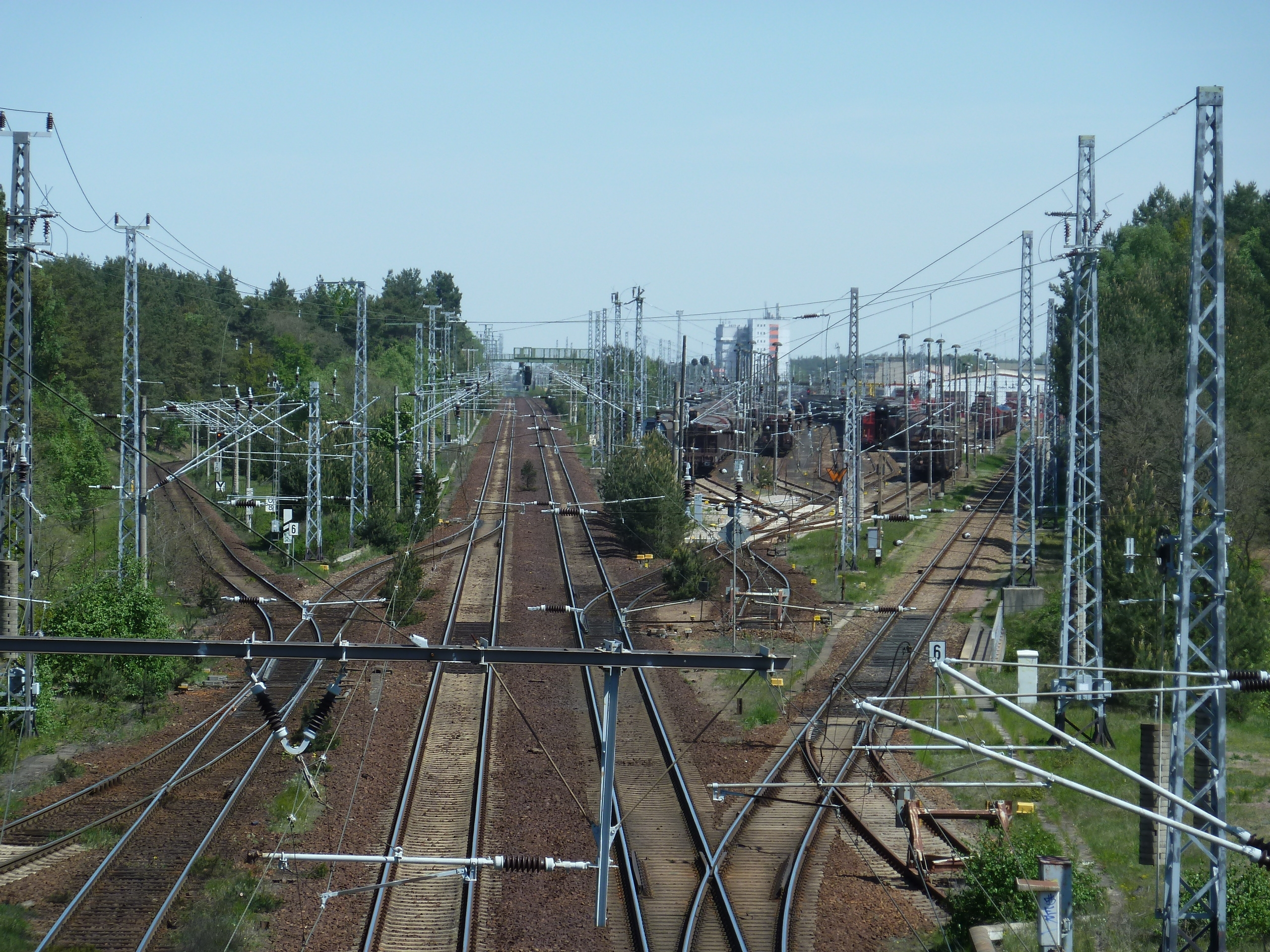 Blick von Südwesten auf den Bahnhof SeddinUnknown seddin railway station, view from southwest